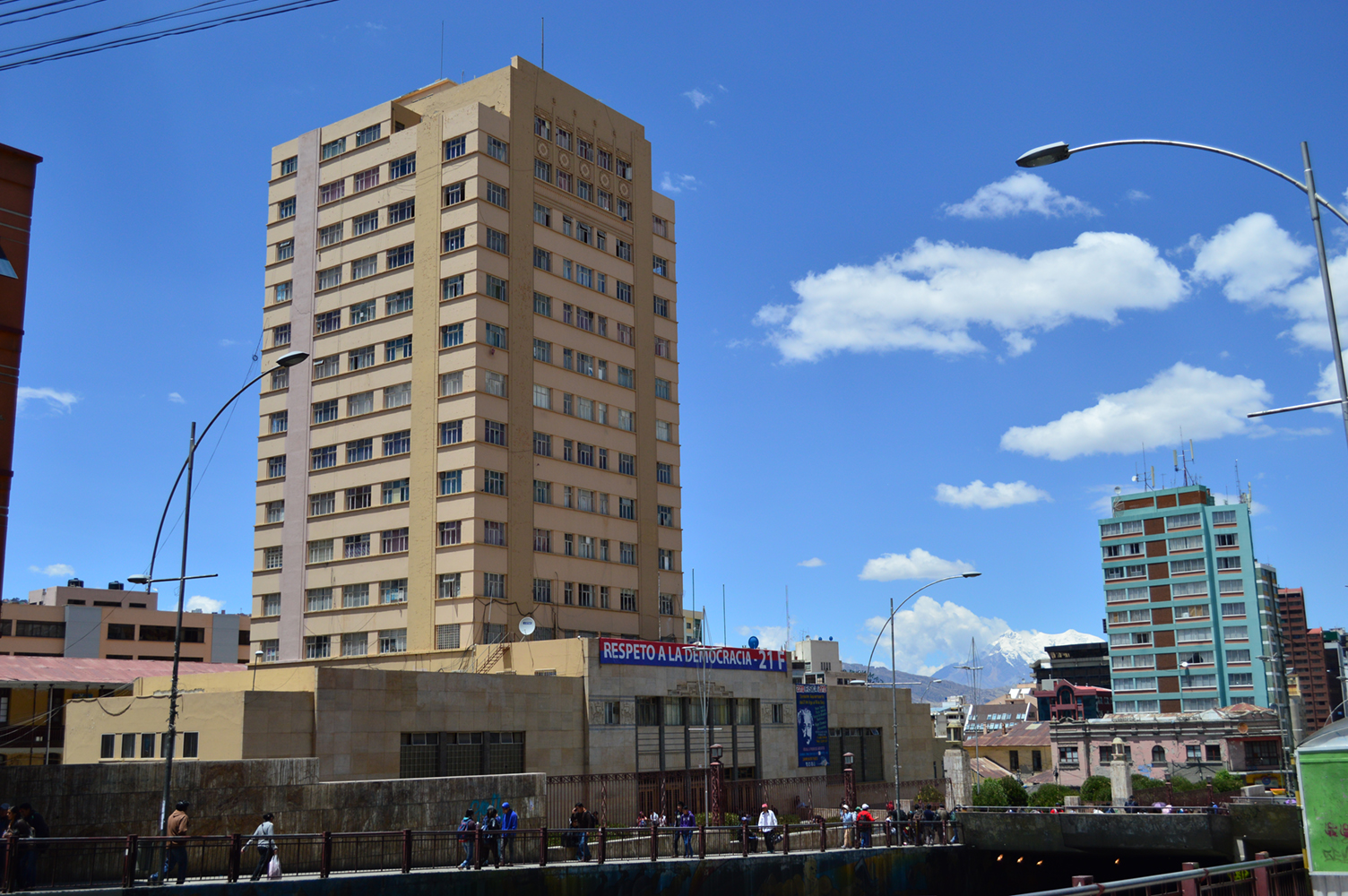 Universidad Mayor de San Andrés This medium shows the protected monument with the number L/00-136 in Bolivia.